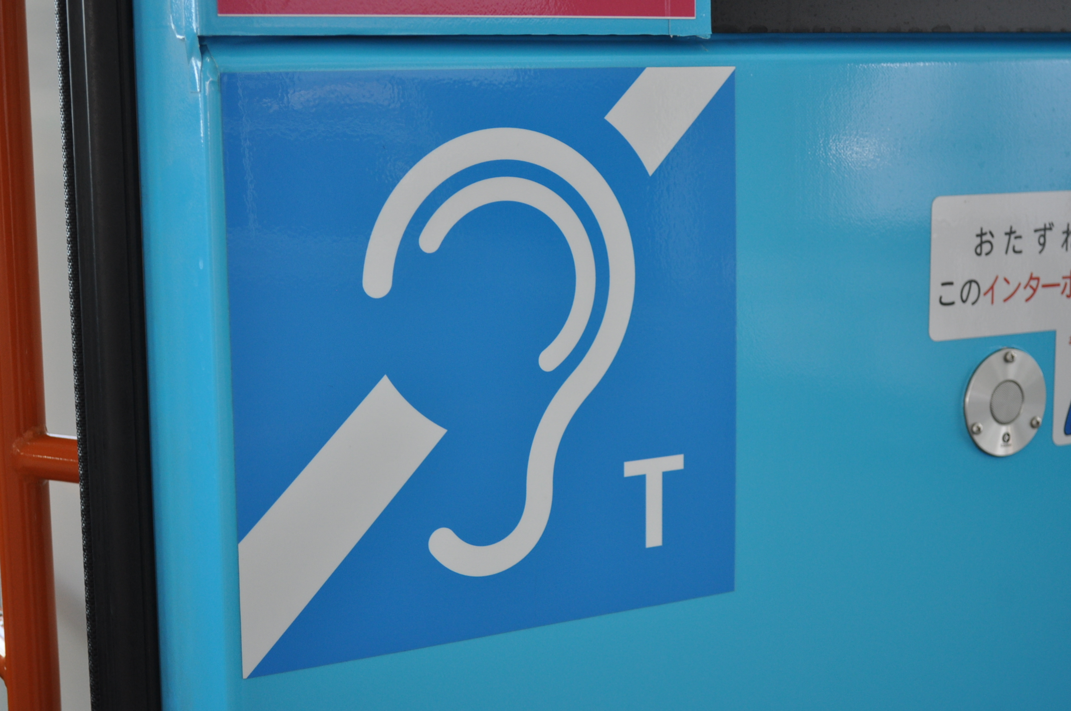 磁気誘導ループ（ヒアリングループ）が装備されている旨を示すサイン